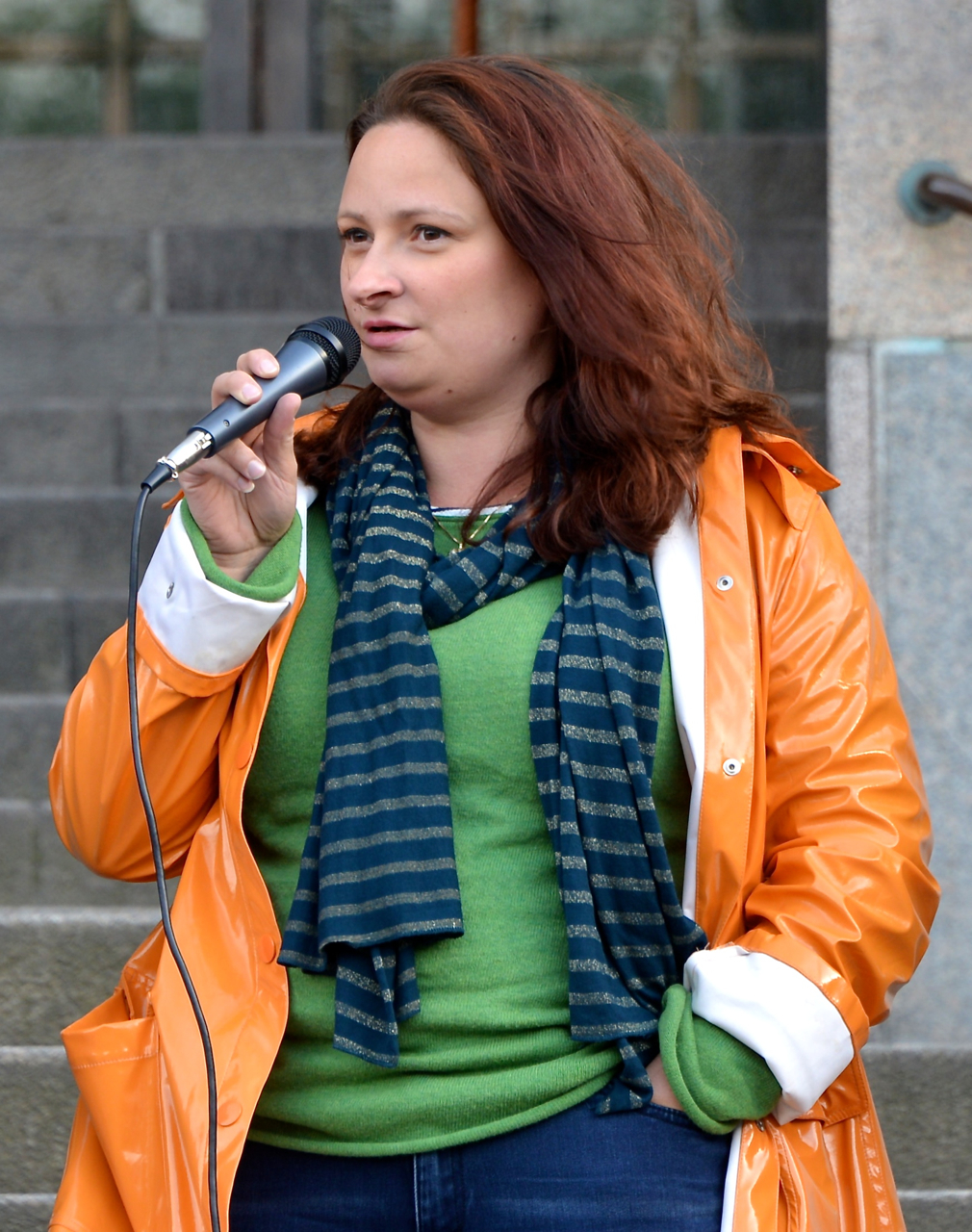 GAPF-manifestation på Medborgarplatsen i Stockholm den 24 juni 2014.